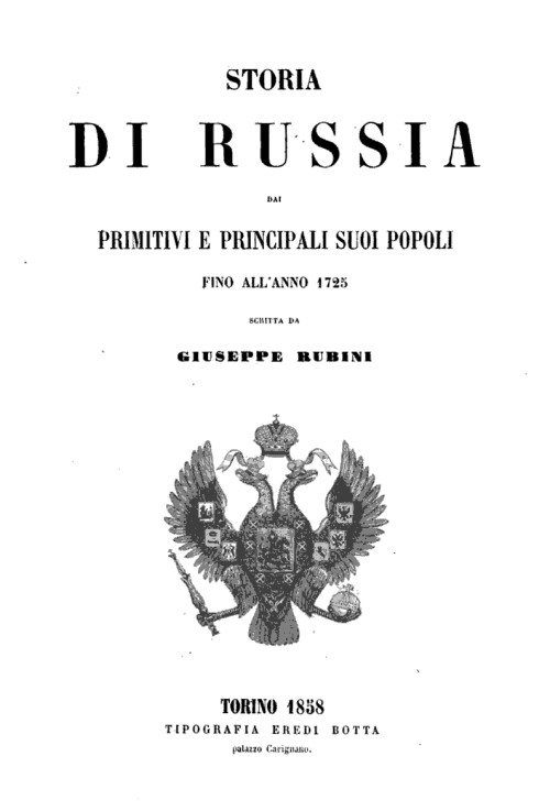 Frontespizio del libro